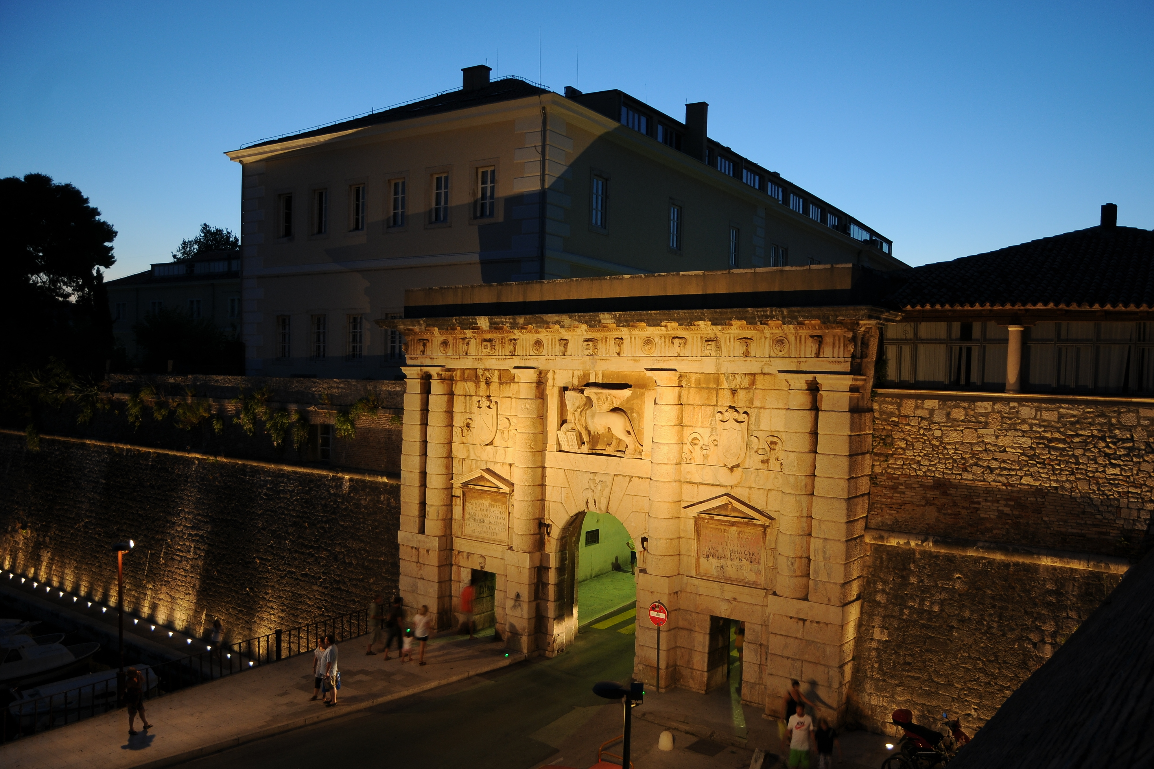 Kopnena Vrata, Zadar Das monumentale Stadttor (Porta terraferma) zum Festland, von Michele Sanmicheli aus dem Jahre 1543 im Hafen Foša. Es sind Überreste aus der römischen Zeit erhalten geblieben, wie auch aus dem Mittelalter, doch der größte Teil dieses Bauwerkes geht zurück in das 16 Jahrhundert. Neben den Stadtmauern befindet sich der mittelalterliche „Kapitänsturm“.